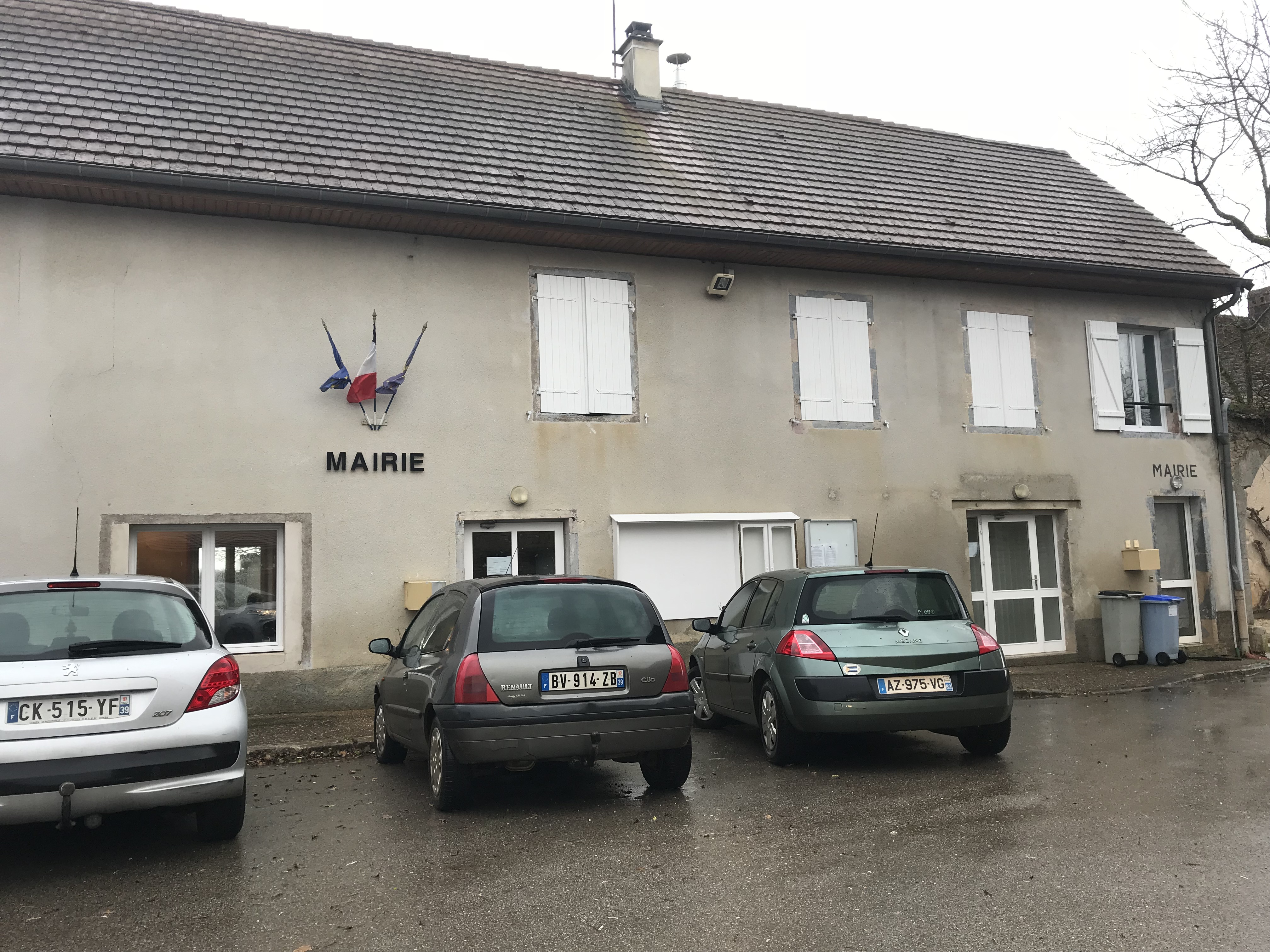 Image de Romain (Jura, France) en janvier 2018.